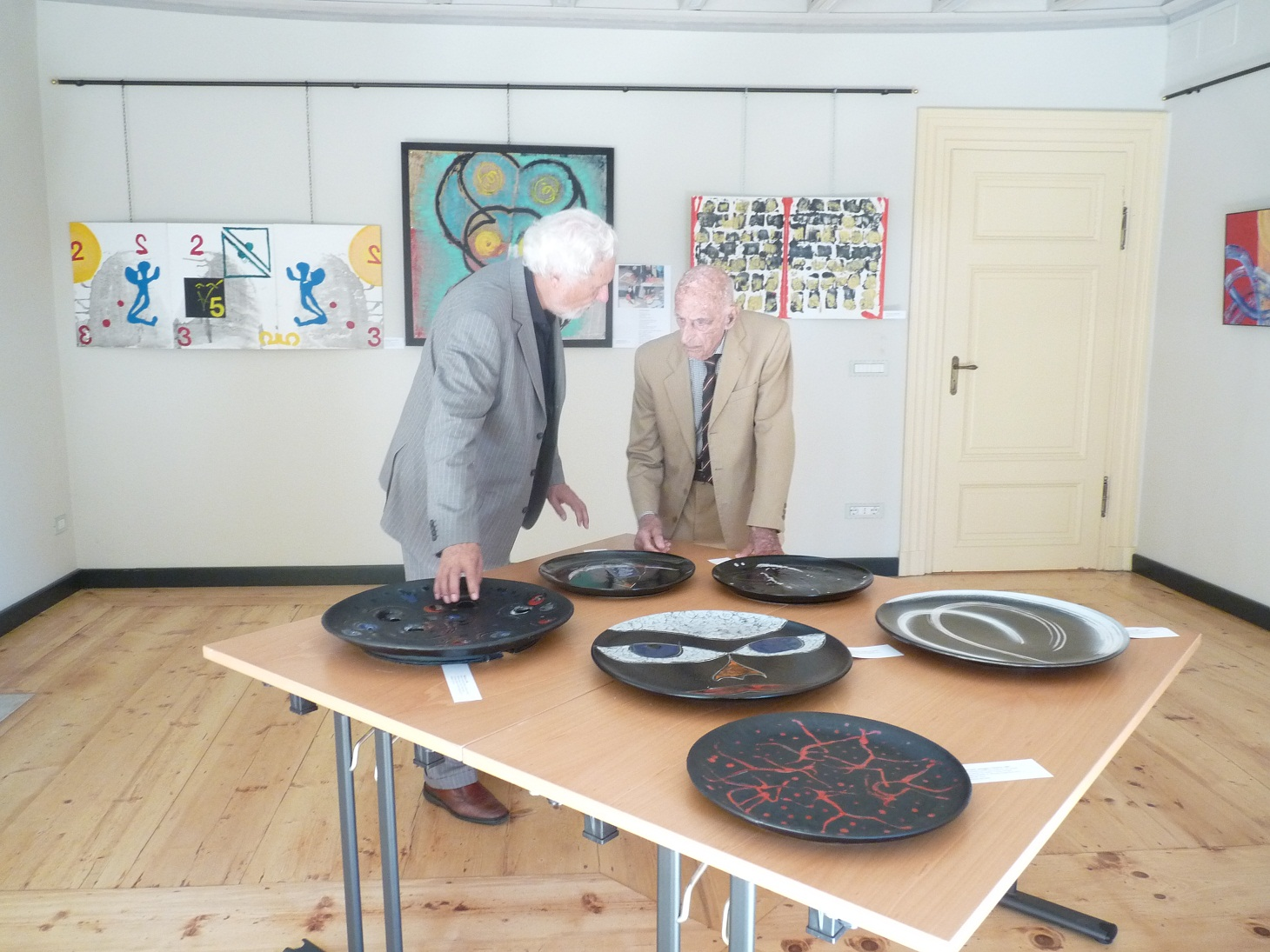 Giorgio Casati e Gillo Dorfles a Villa Carlotta, Tremezzo (CO)